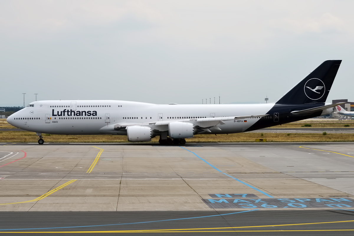 Lufthansa, D-ABYA, Boeing 747-830